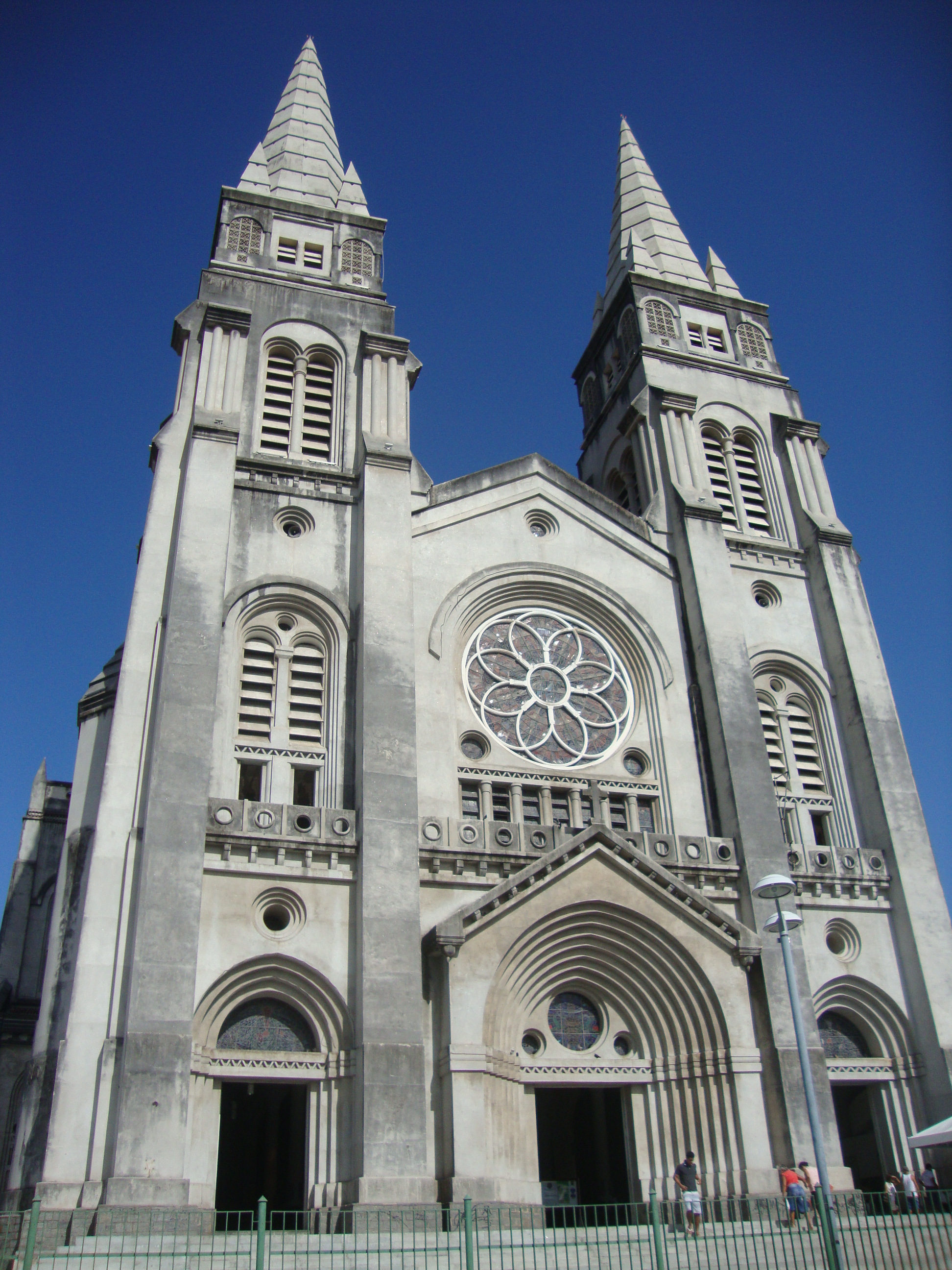 A Sé de Fortaleza - CE, Brasil.